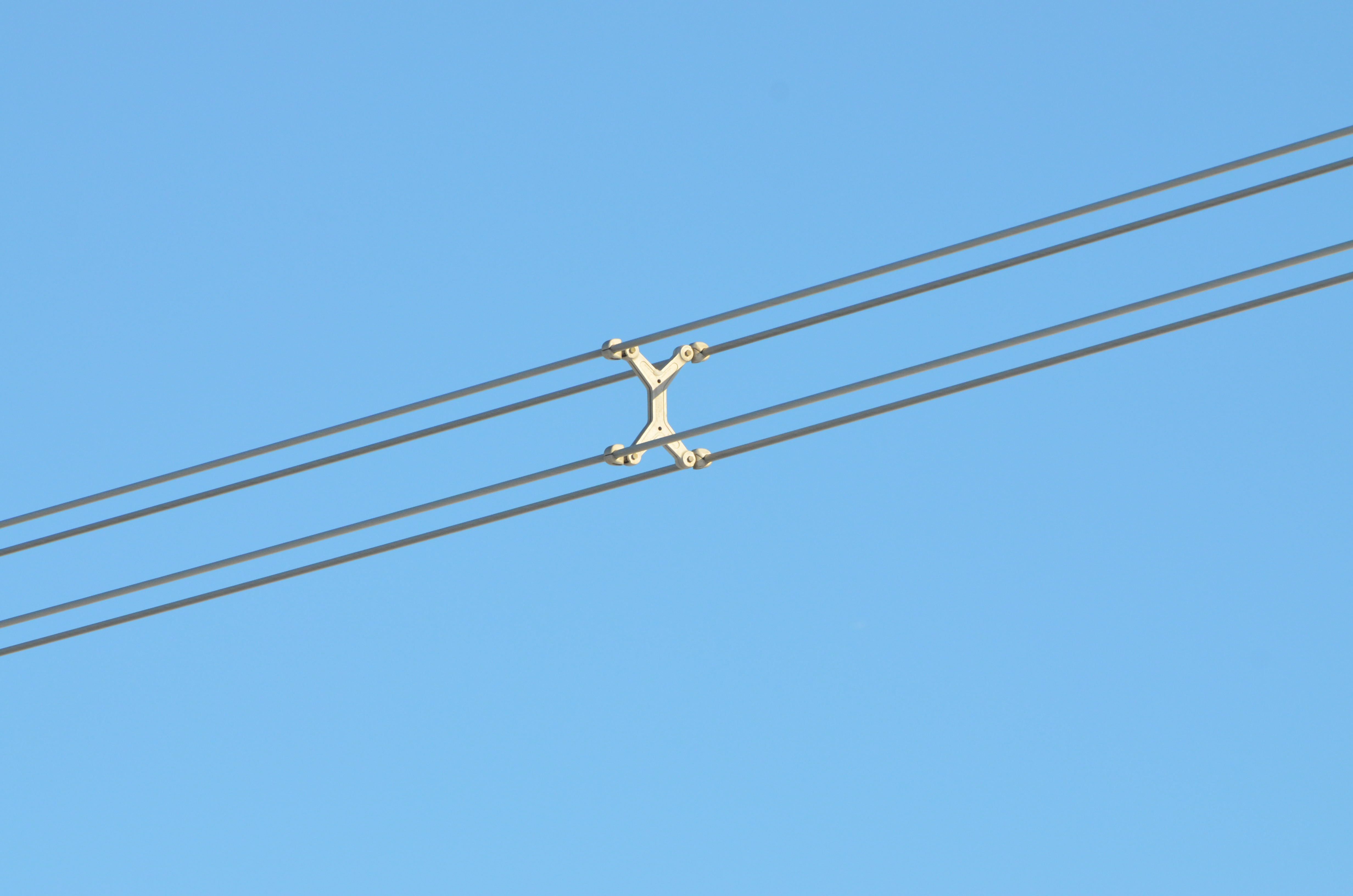 Détail de la structure d'un pylône électrique québecois.